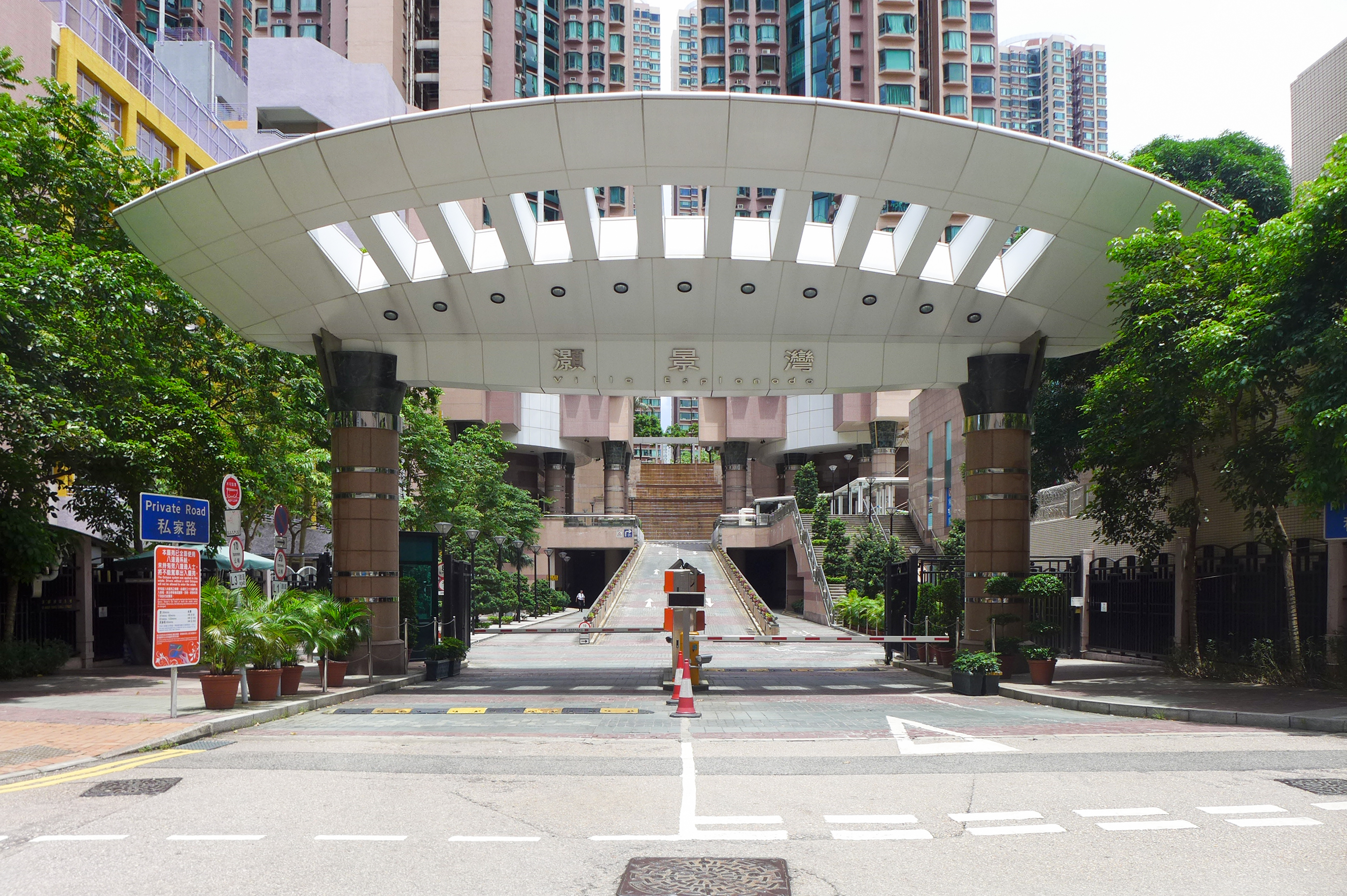 Villa Esplanada Entrance